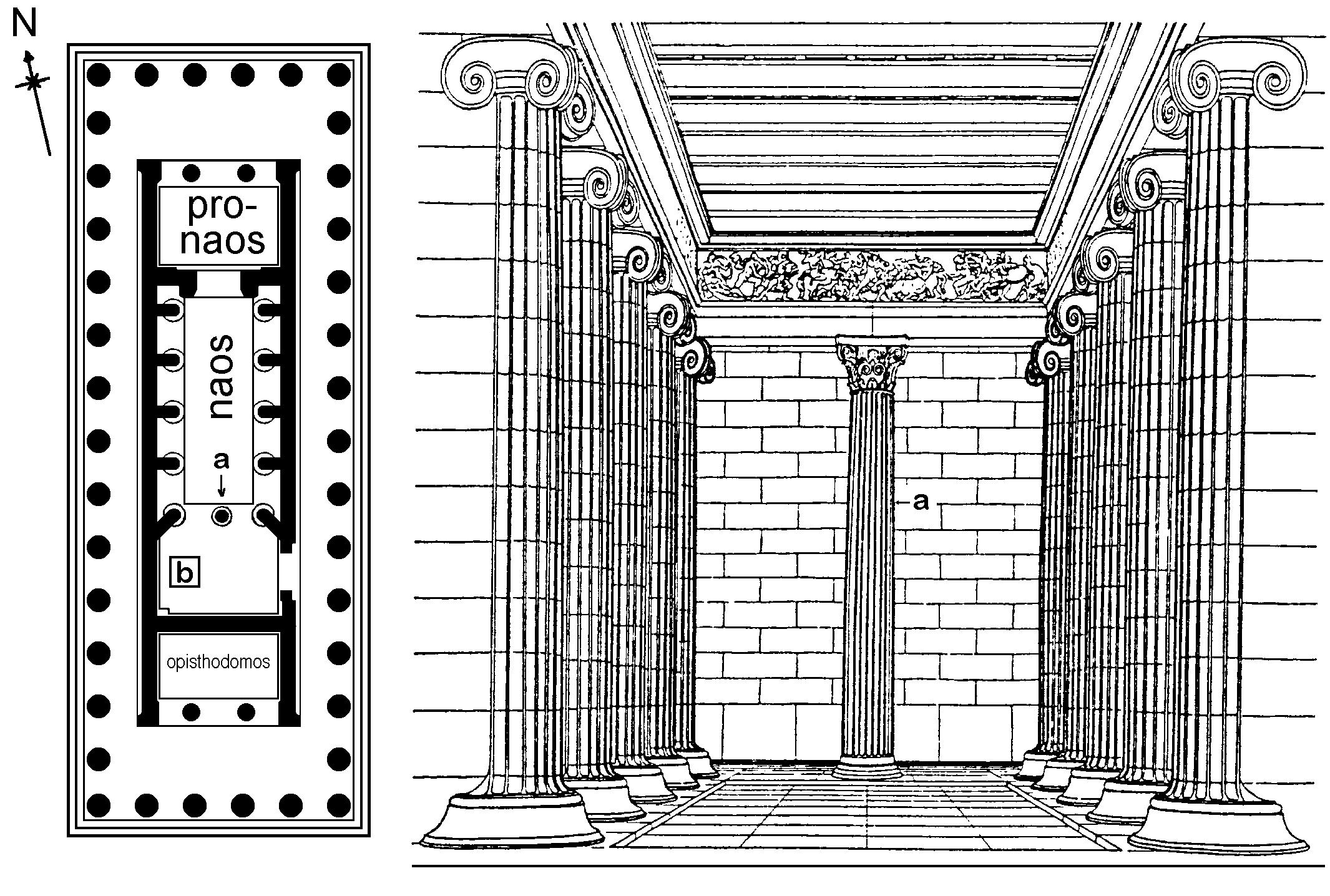 De tempel van Apollo, plattegrond en reconstructie van het interieur. Eigen werktekeningen